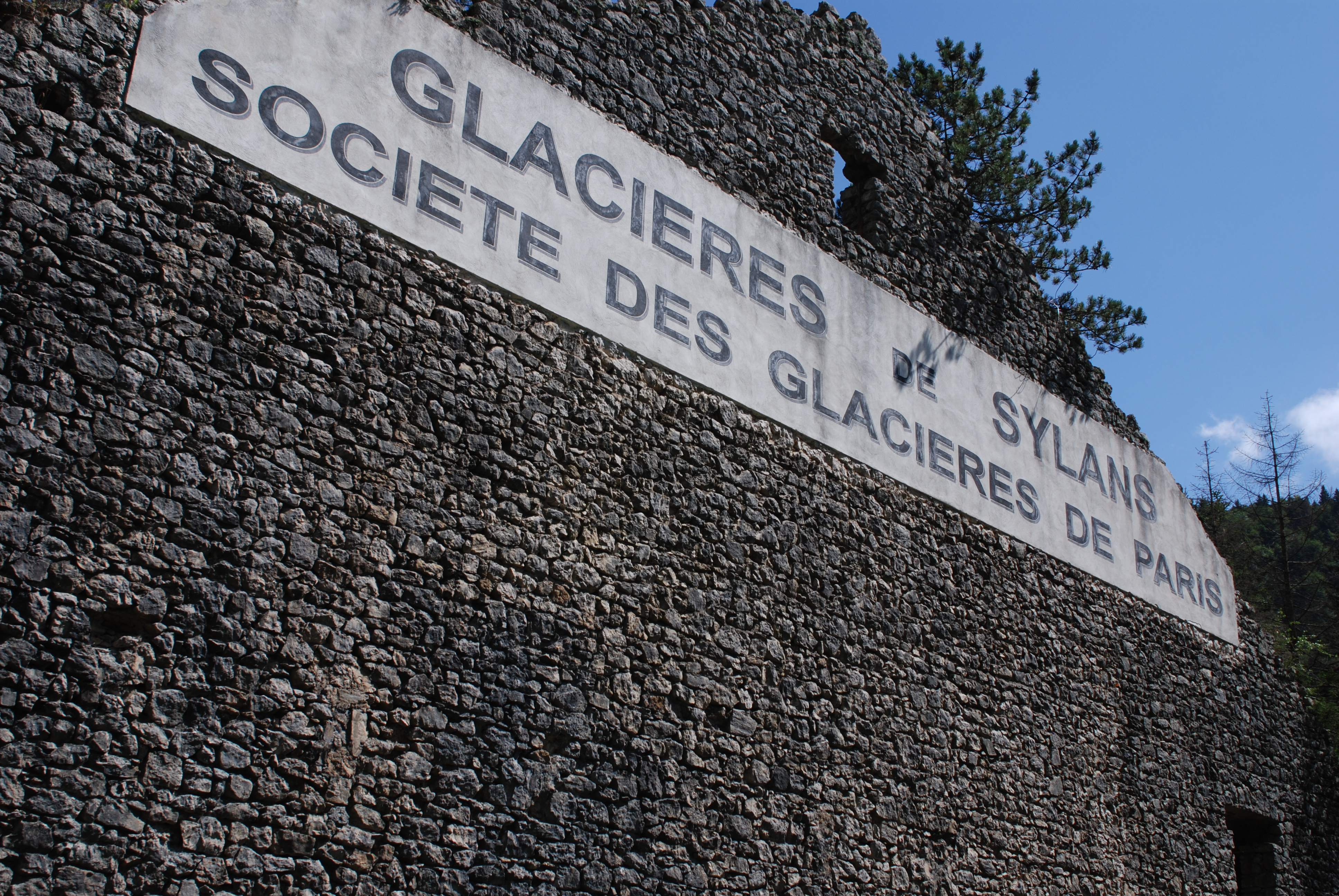 Fassade Eisfabrik Glacières de Sylans, Sylans.